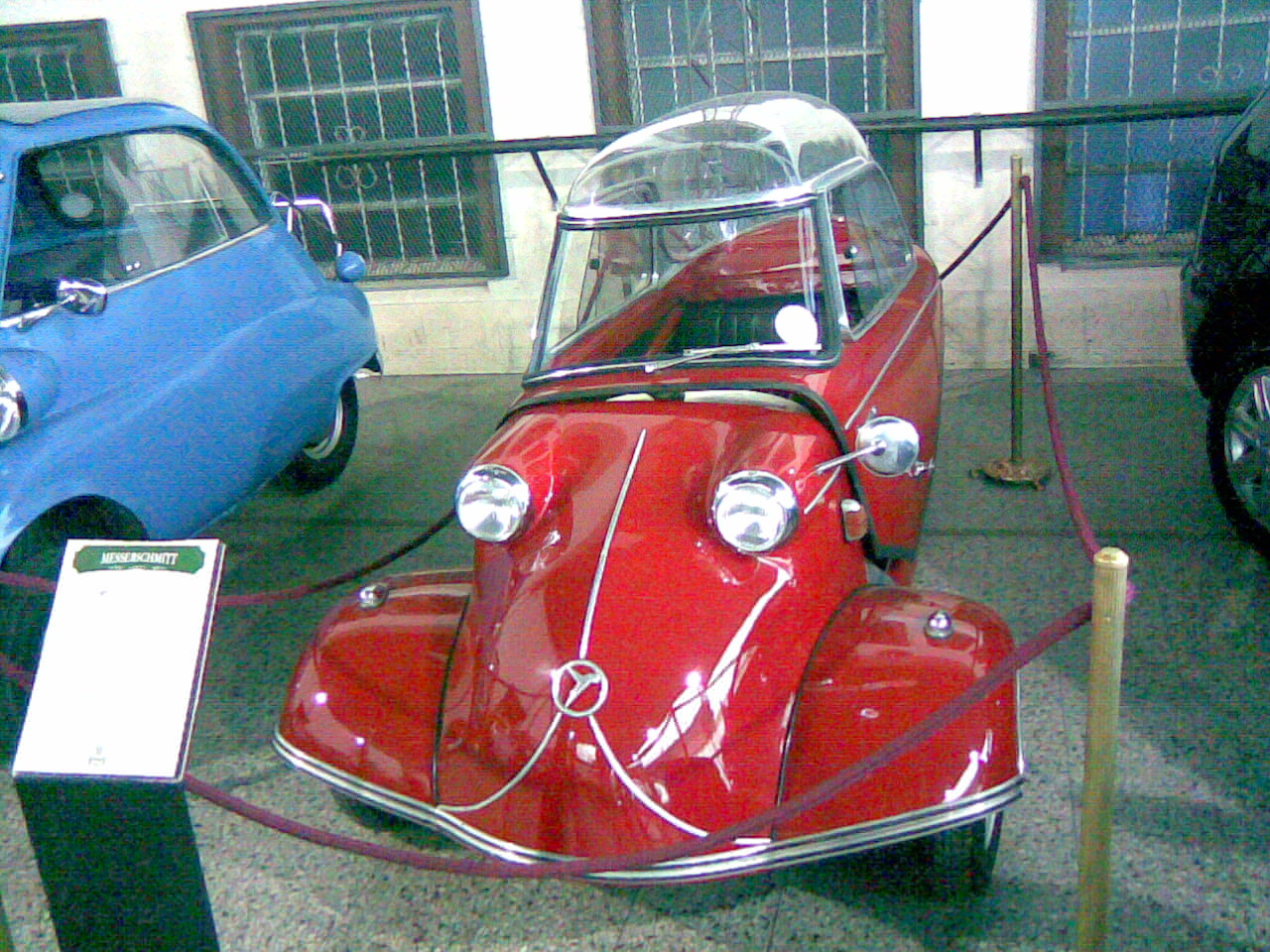 Messerschmitt KR200 vista frente